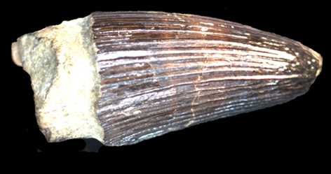 Zahn eines Machimosaurus